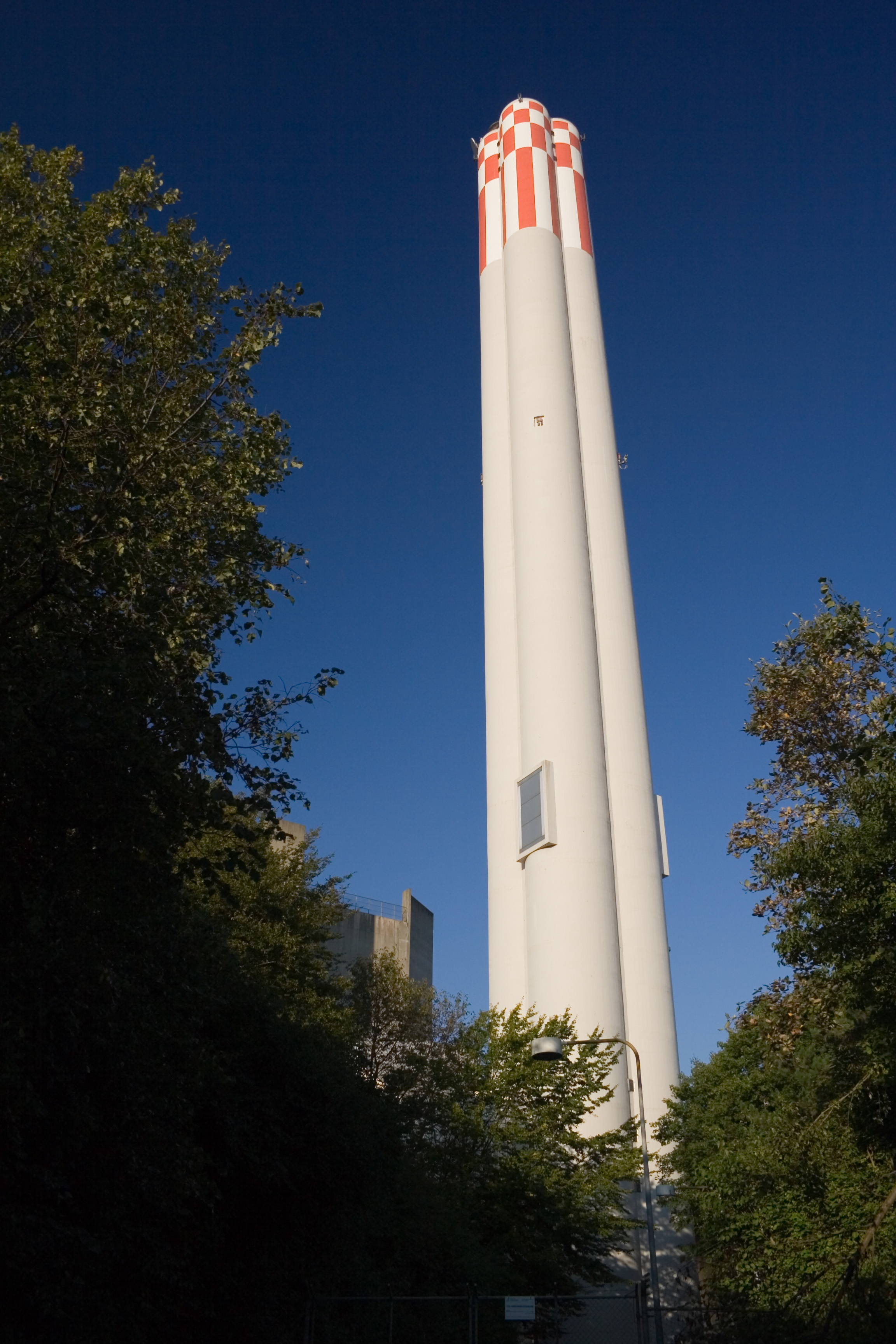 Kamin des Heizkraftwerkes Aubrugg in Zürich, Schweiz.Aufnahme mit Polarisationsfilter.